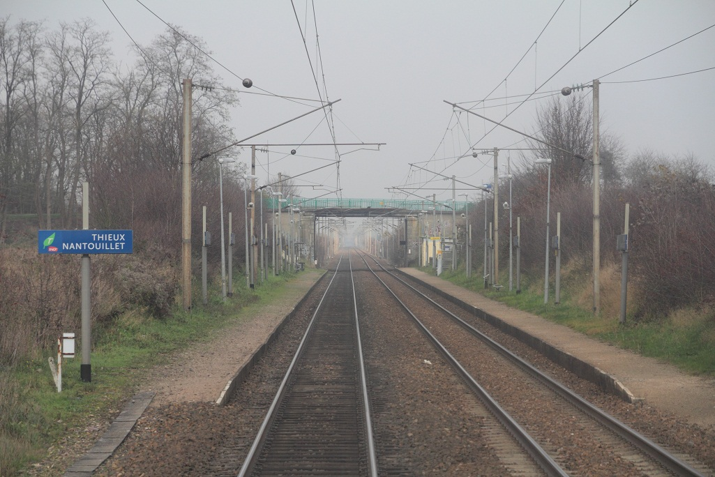 Vue générale de la gare de Thieux - Nantouillet en direction de Crépy-en-Valois (décembre 2012), Ile-de-France, France.